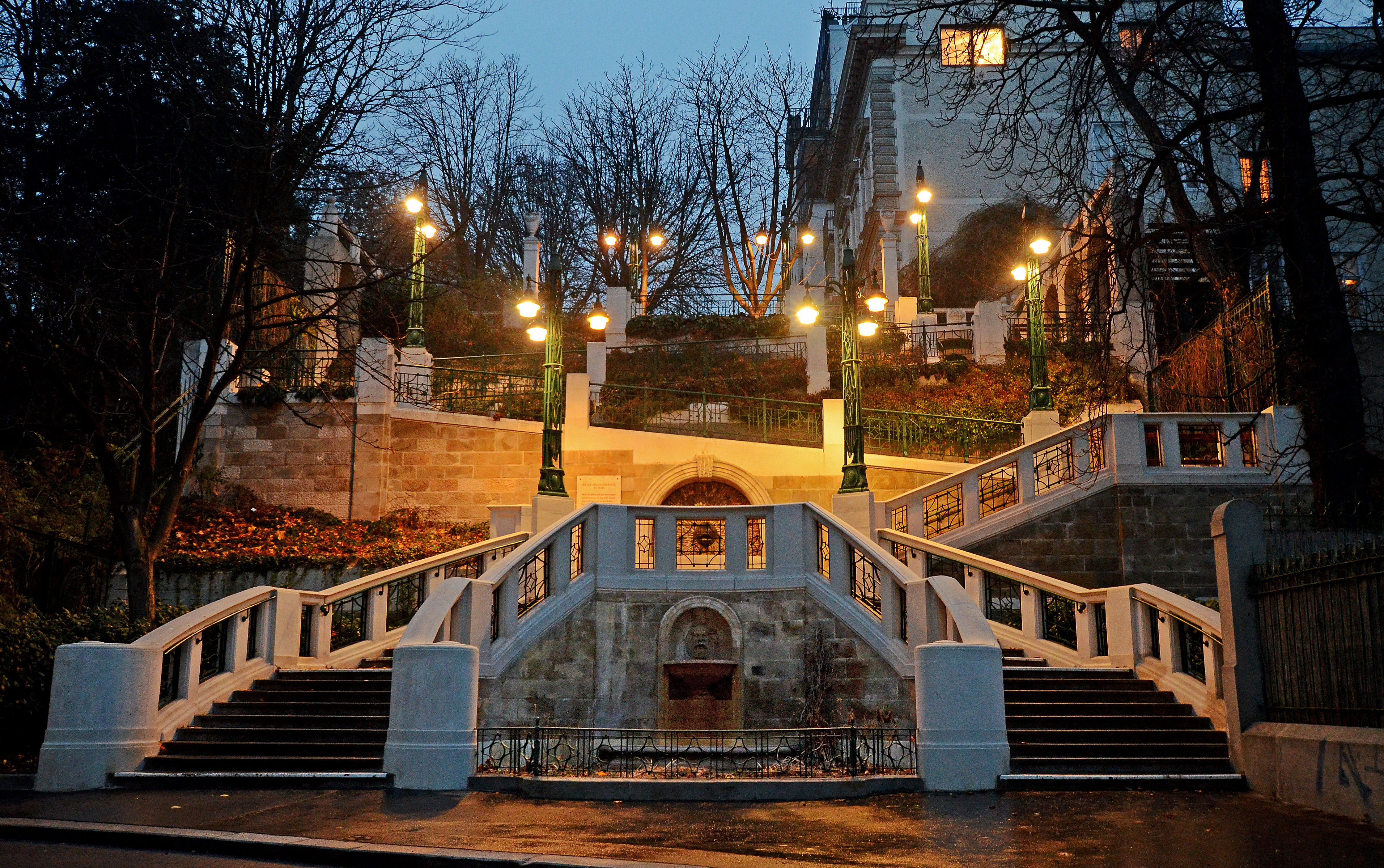 Strudlhofstiege am Abend